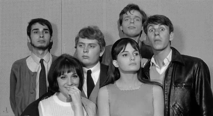 Screenshot dal film Altissima pressione (1965)